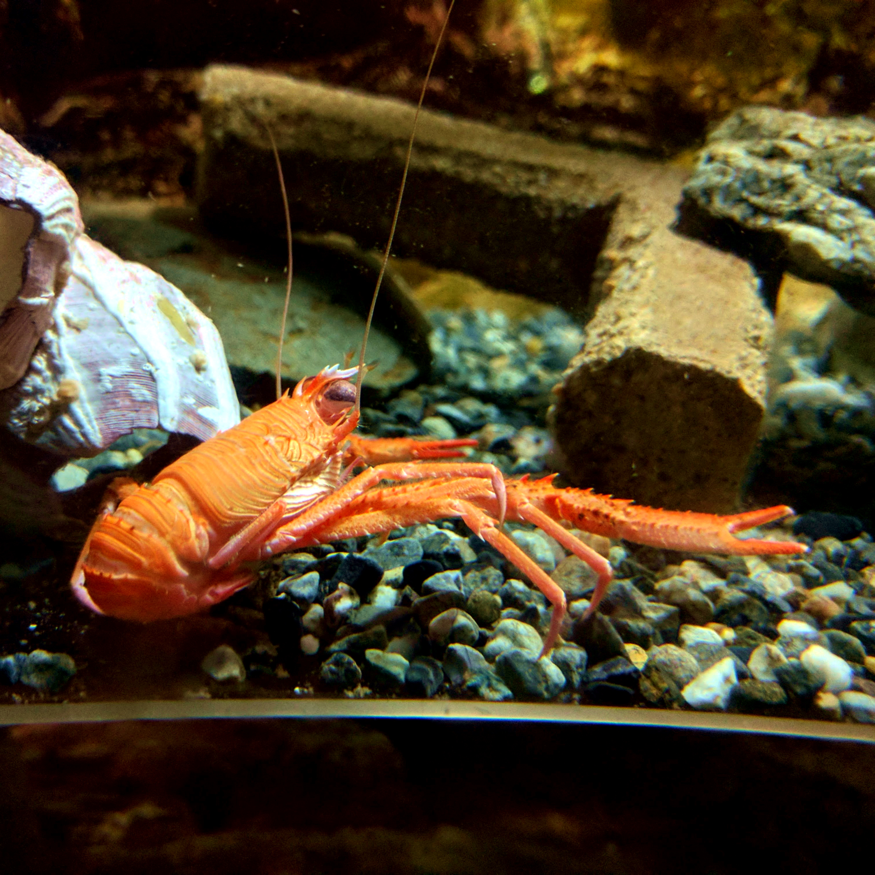 オオコシオリエビ Squat lobster Wikispecies has an entry on: Cervimunida princeps. Species Cervimunida princeps Benedict, 1902 動物界 節足動物門 甲殻綱 エビ目（十脚目） コシオリエビ科 オオコシオリエビ属 Location: Shima marinland, Mie Pref., Japan Other photos: NCBI Taxonomy ID:941195 EOL link: Cervimunida princeps uBio search link: Cervimunida princeps